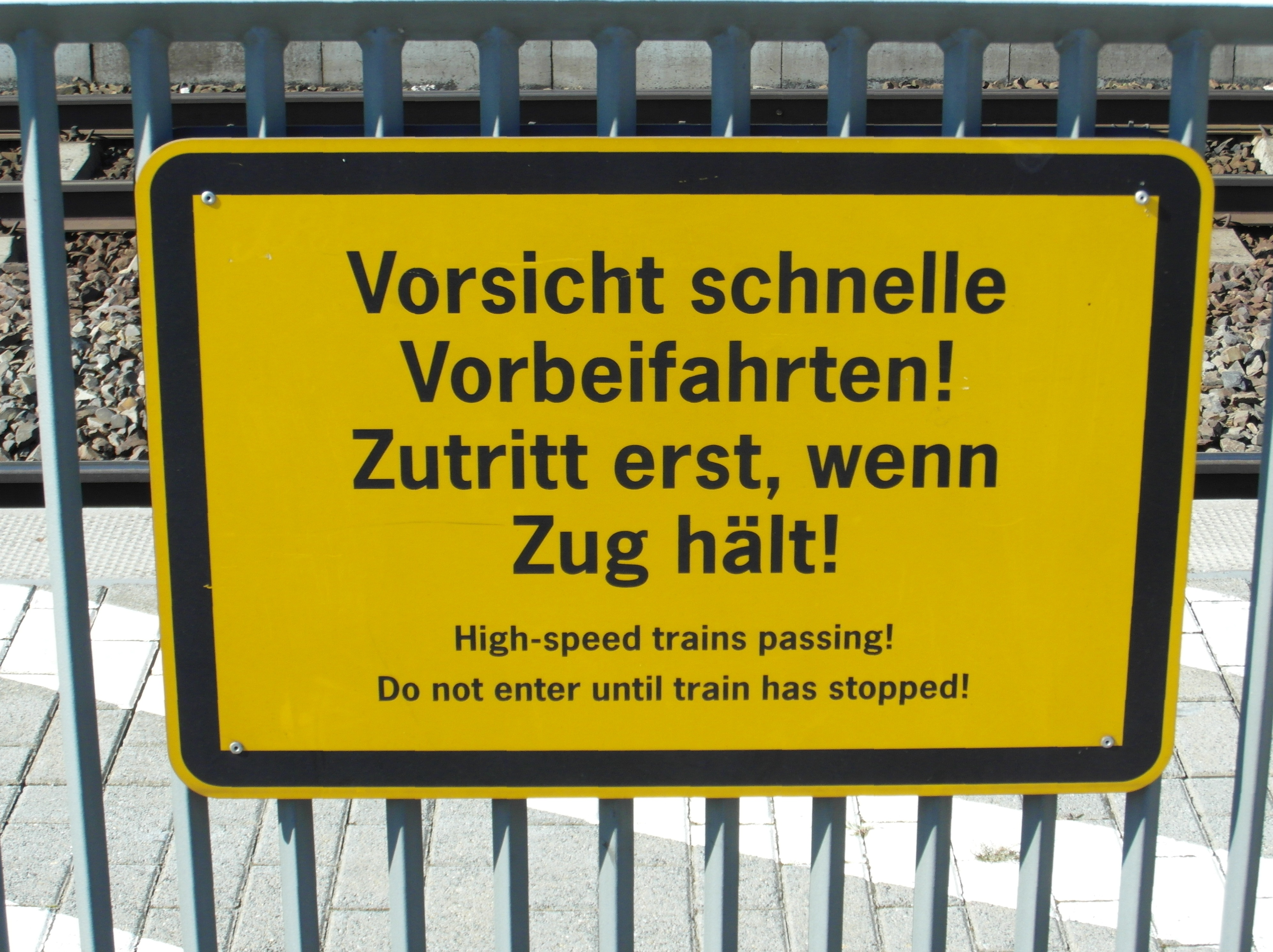 Bahnhof Neustadt (Dosse) im Landkreis Ostprignitz-Ruppin im Land Brandenburg